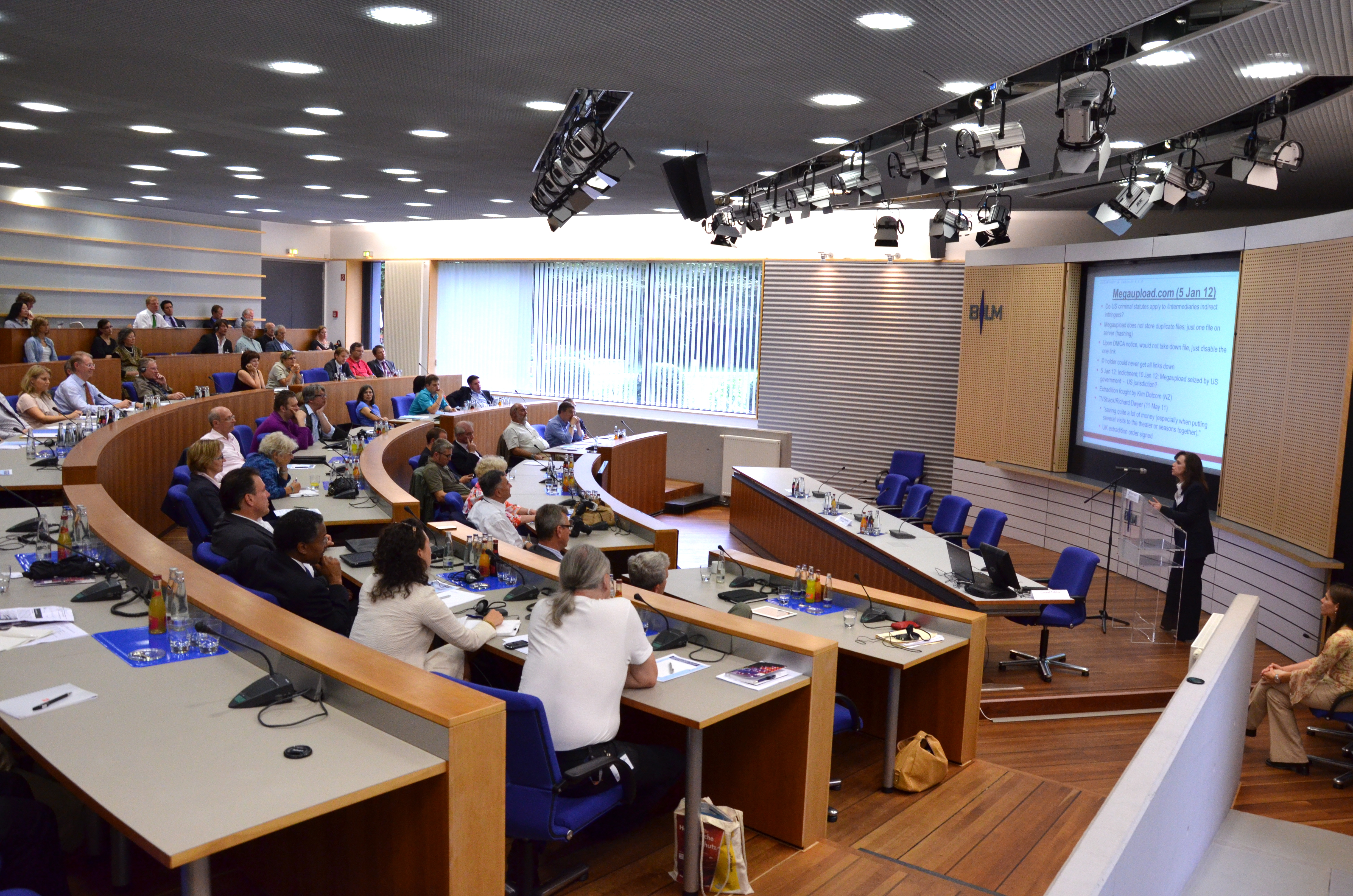 Blick ins Publikum